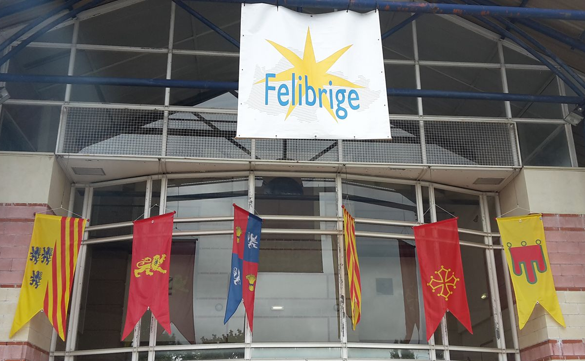 Logo dau Felibritge e bandièras de las províncias a la Santa Estèla de Banhèras (2017)